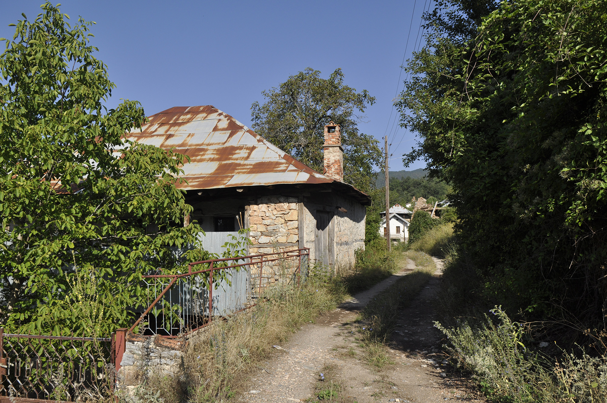 Интересна стара архитектура и убава природа во Присовјани